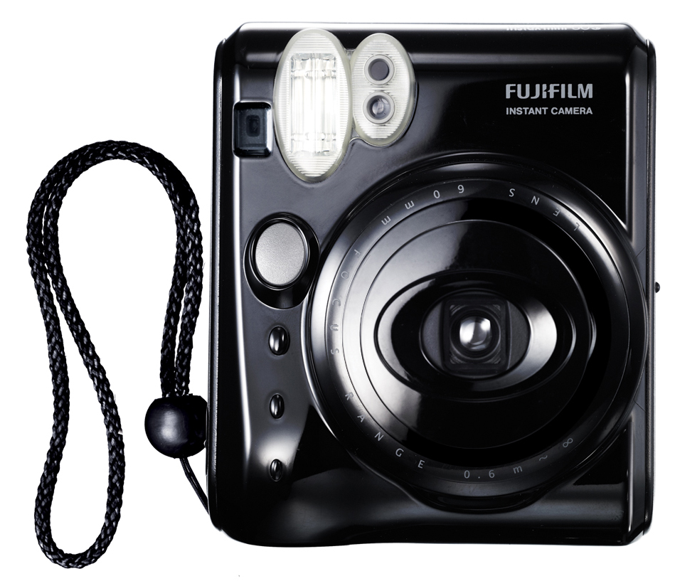 Aparat do fotografii natychmiastowej.